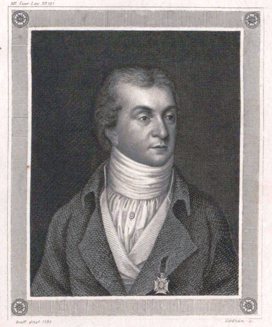 Portrait von Karl Christian Ernst von Bentzel-Sternau, Pseud. Horatio Cocles 1767 - 1849